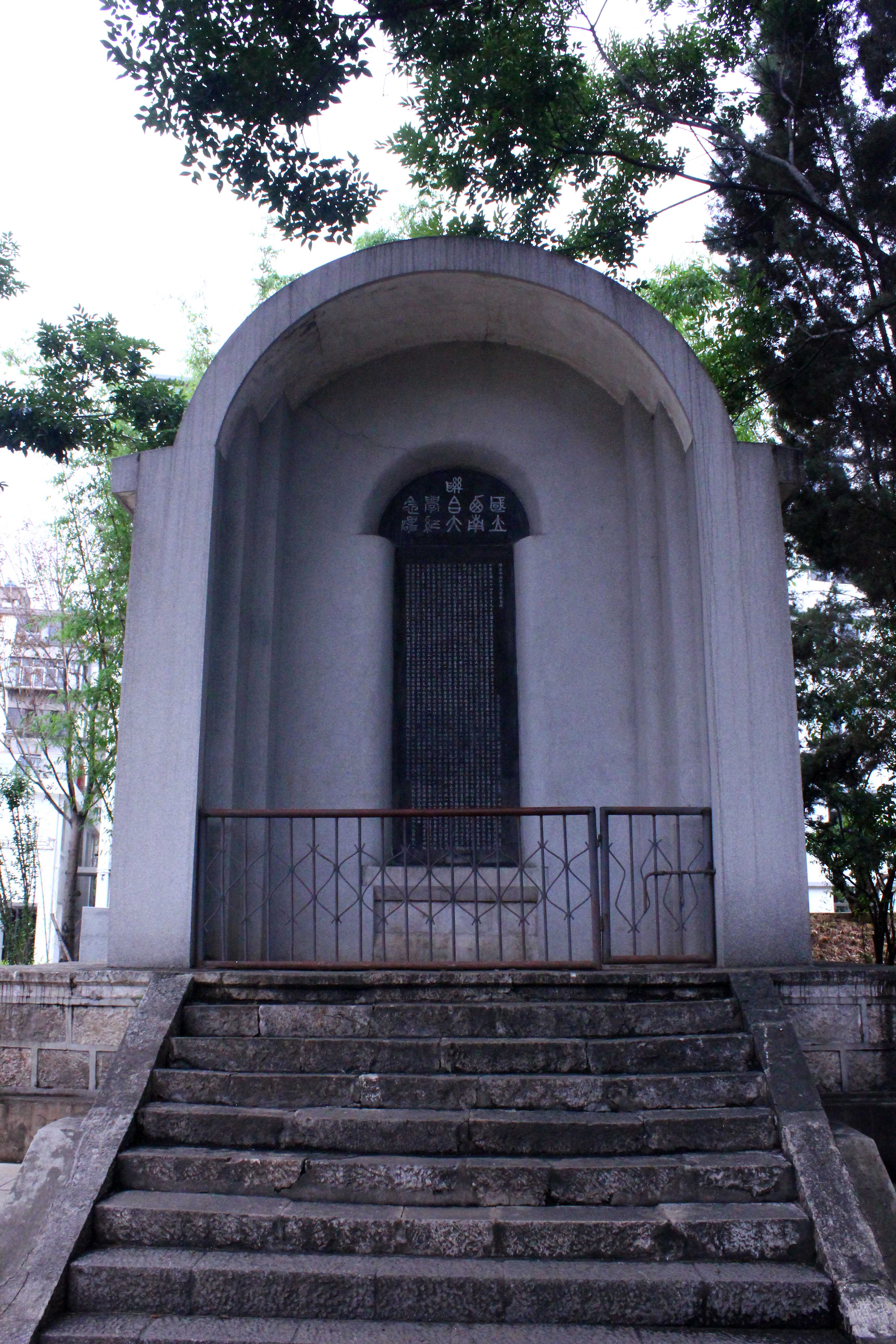 西南联大纪念碑，位于今云南师范大学校园内。